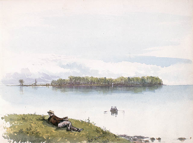 Île Dorval